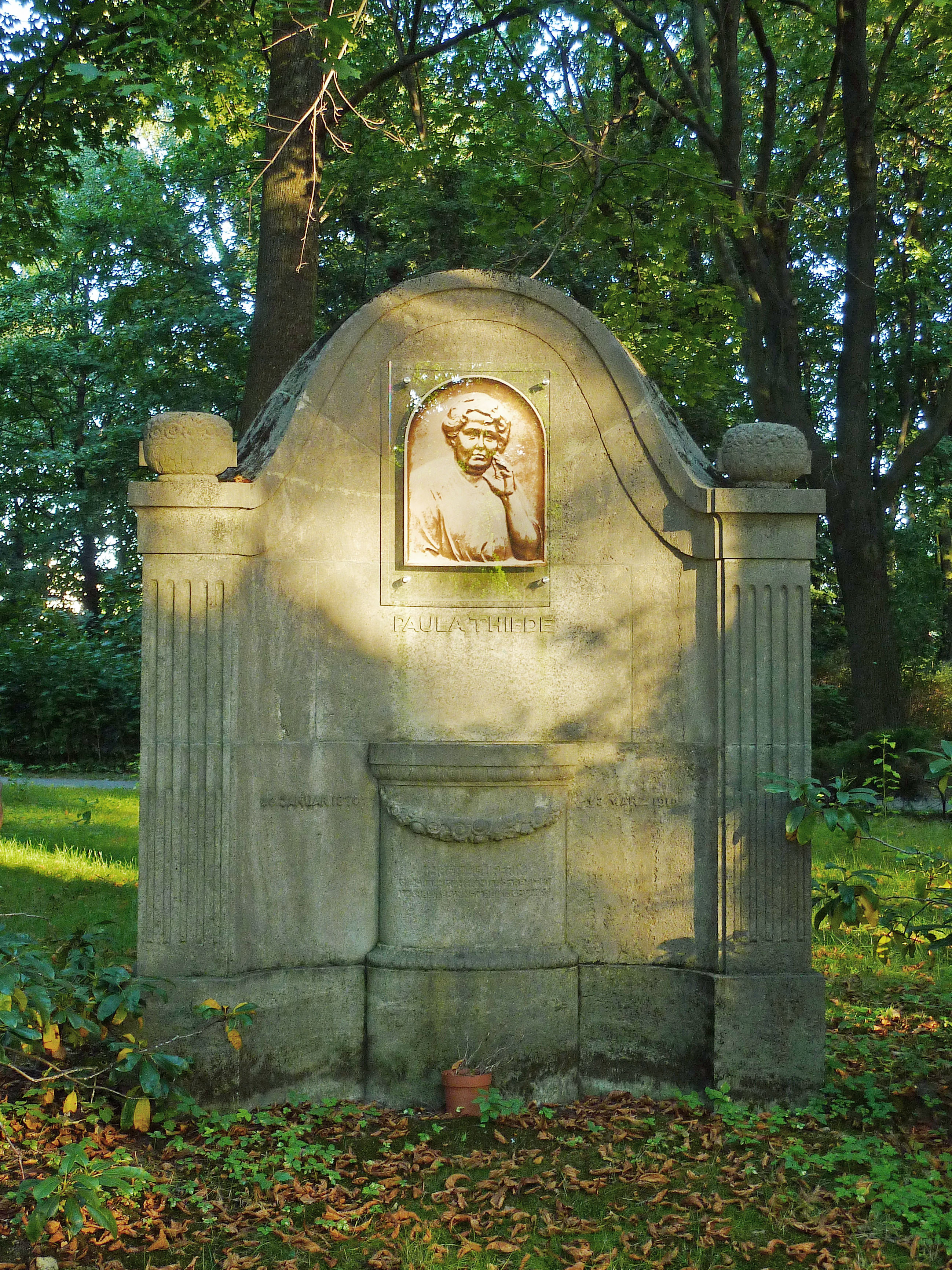 Grabmal für Paula Thiede auf dem Zentralfriedhof Friedrichsfelde in Berlin-Lichtenberg.